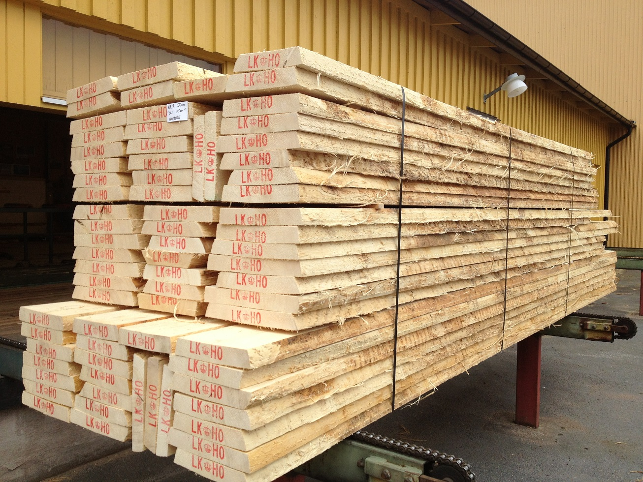 Virke klart för leverans